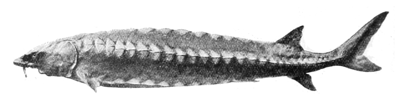 Acipenser sp.